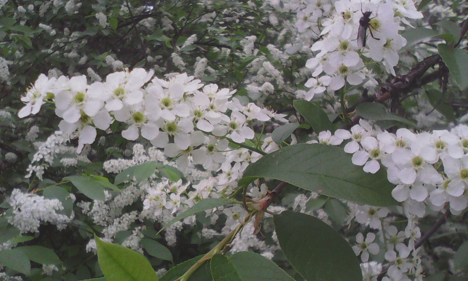 На Среднем Урале массовый вылет Чёрных мух совпадает со цветением Черёмухи обыкновенной (май месяц).